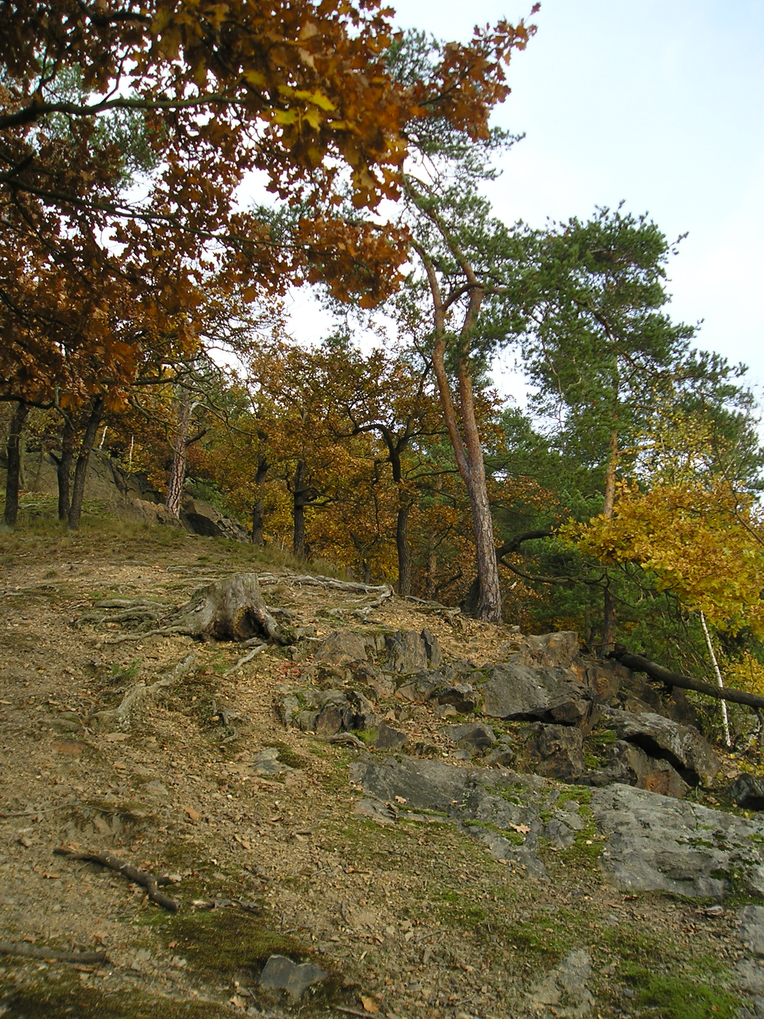 Prudký suťový svah v západní části přírodní rezervace. Vystupující skály jsou droby a spility s rankerovou půdou (ranker typický). Převládá dominance reliktního boru.